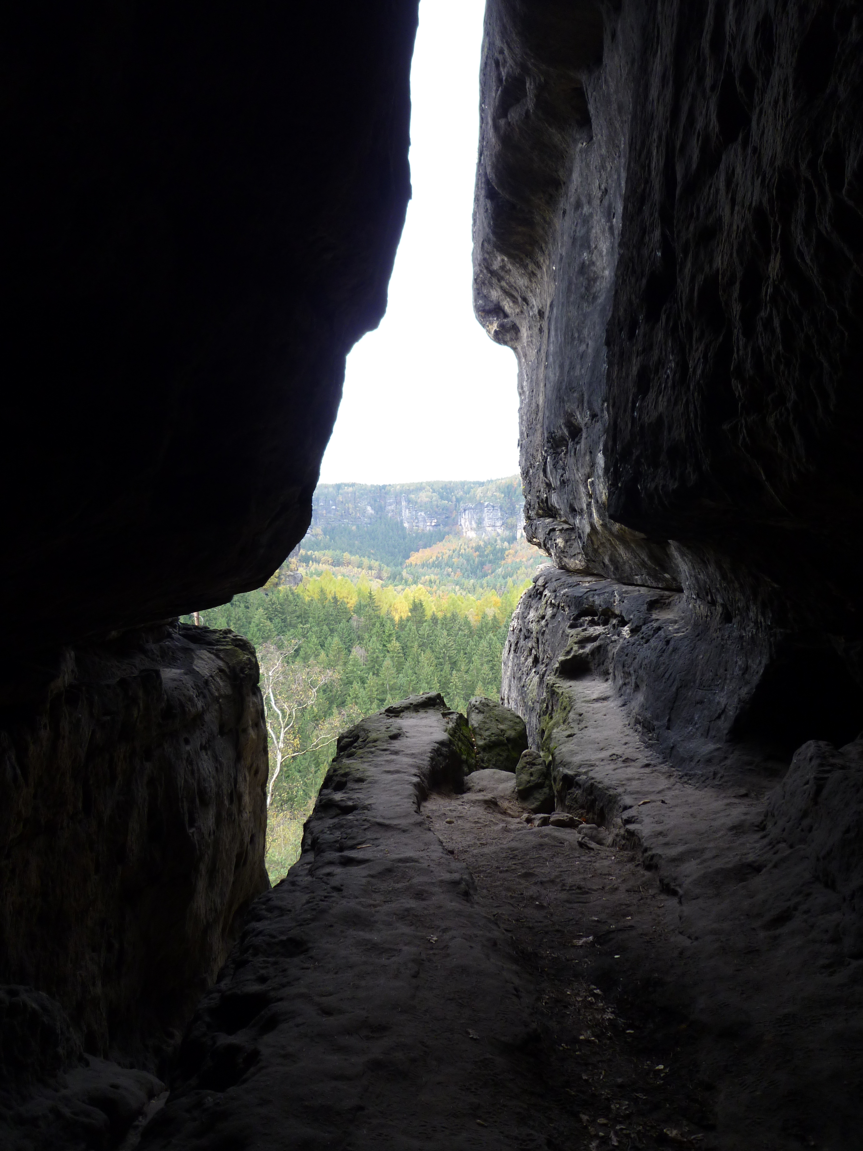 Winterstein, Blick aus der Klufthöhle nach Westen zum Kleinen Winterberg